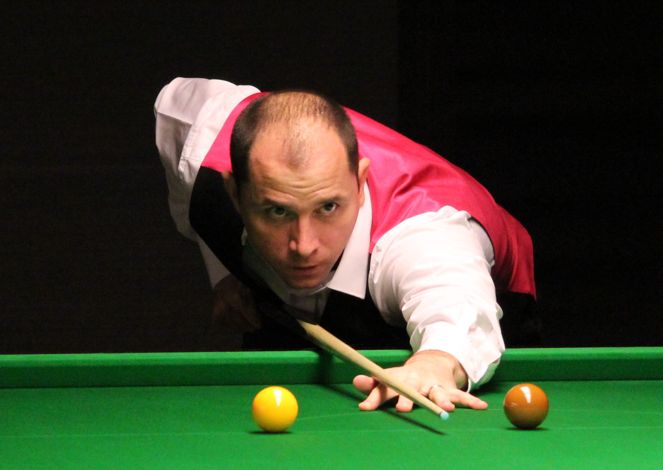 Joe Perry beim Paul Hunter Classic 2011